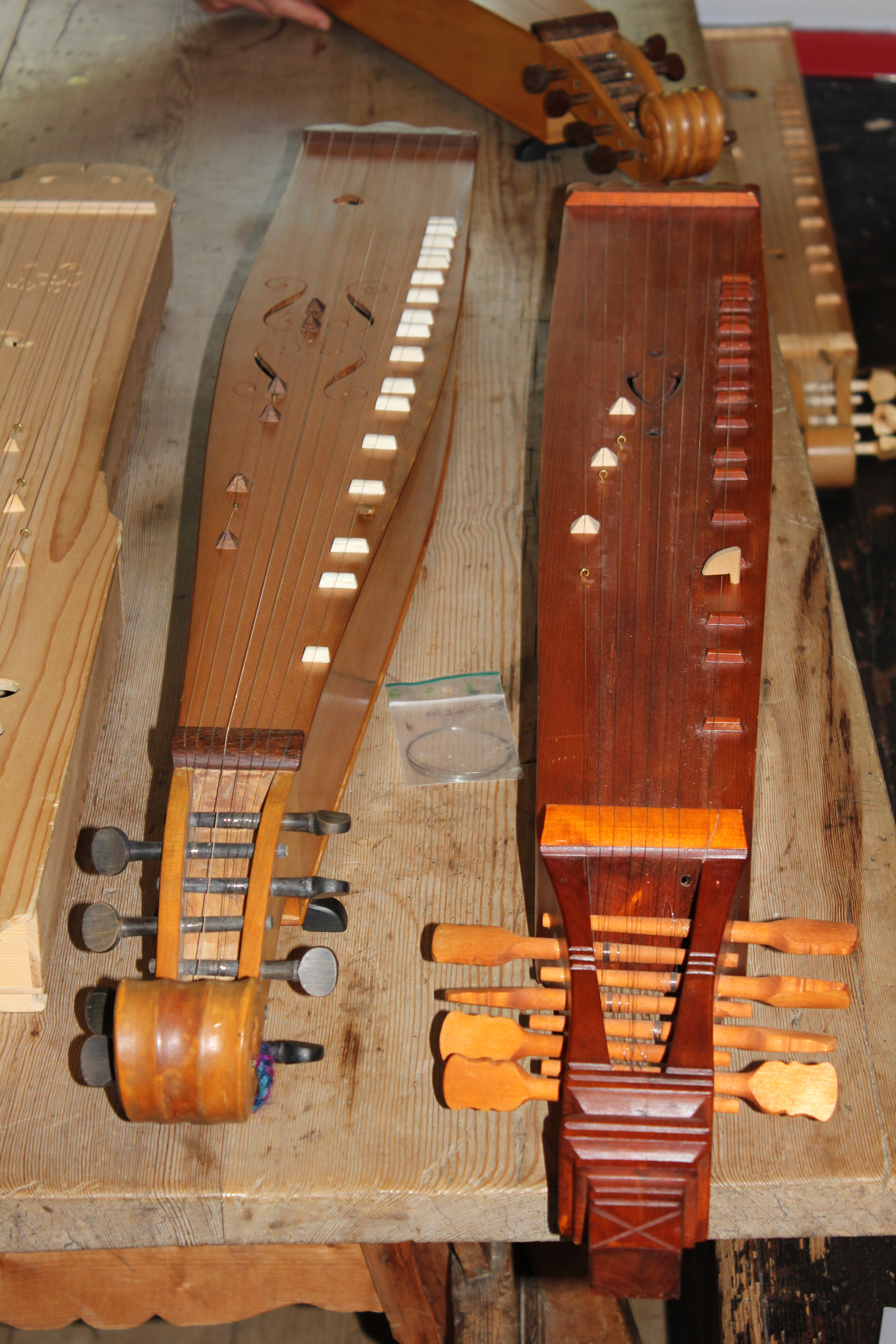 Langeleiker fra Oppland.